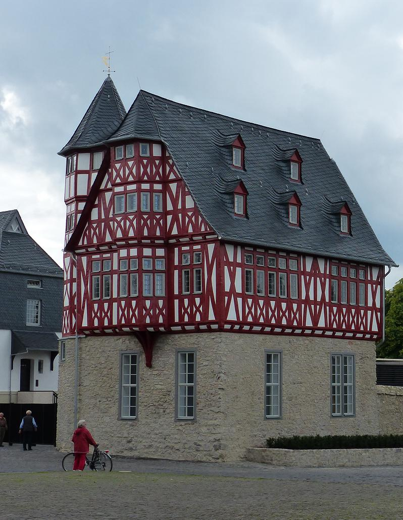 Haus Staffel (Alte Vikarie) nach Abschluss der Sanierung